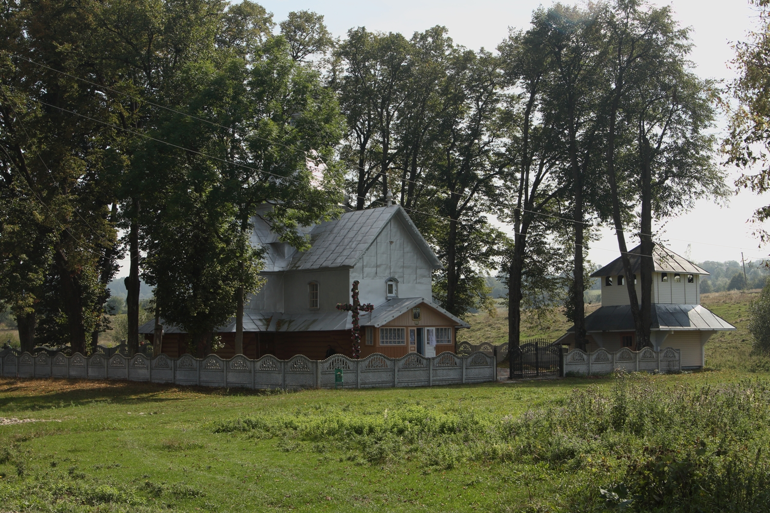 Греко-католицька церква «Чесного Хреста» у с. Середній Майдан, Надвірнянський район